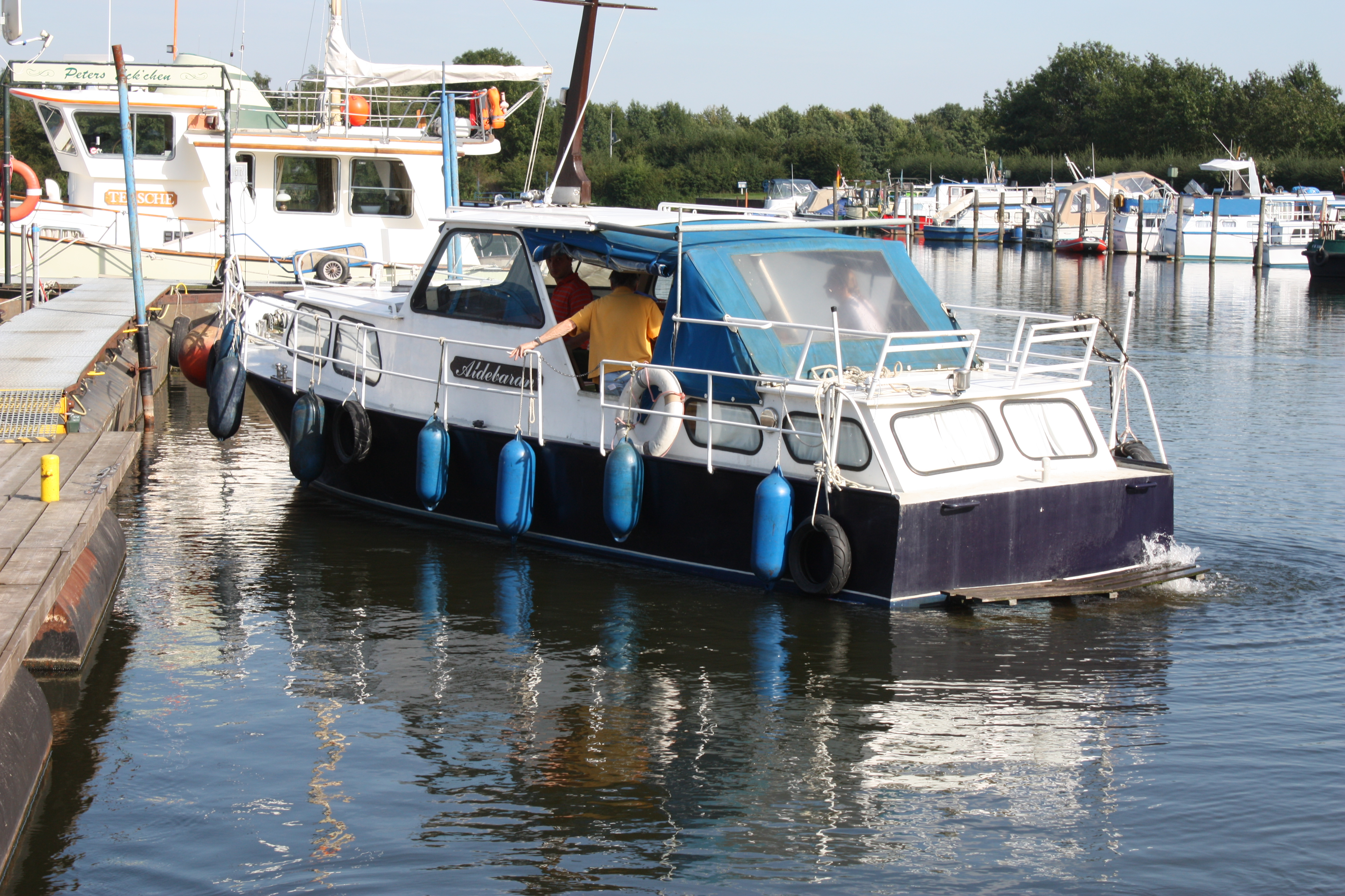 Anlegemanöver mit einem Motorboot; mit 45° langsam an den Steg fahren; mit Rückwärtsgang das heck an den Steg ziehen